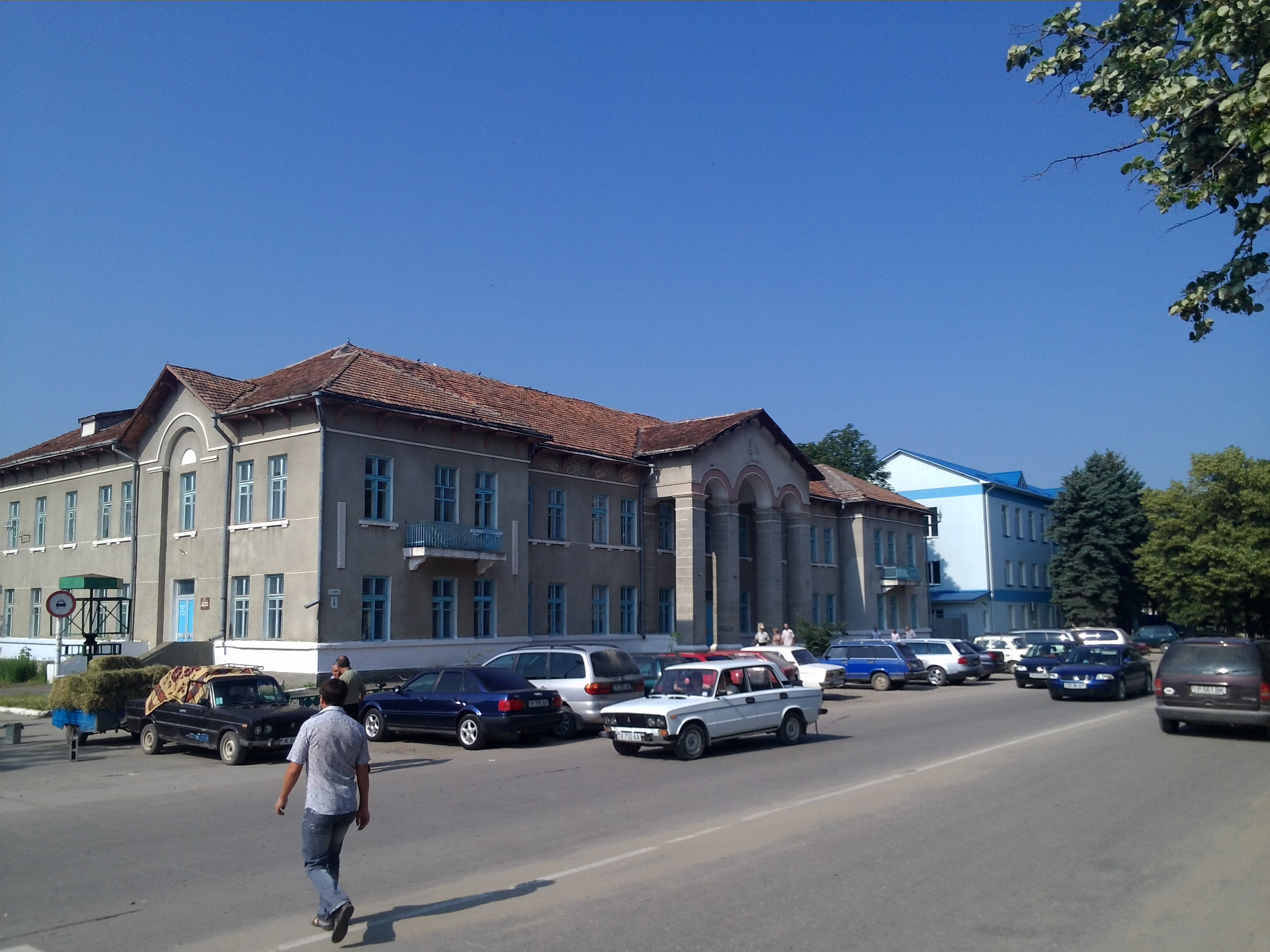 м. Кам'янка